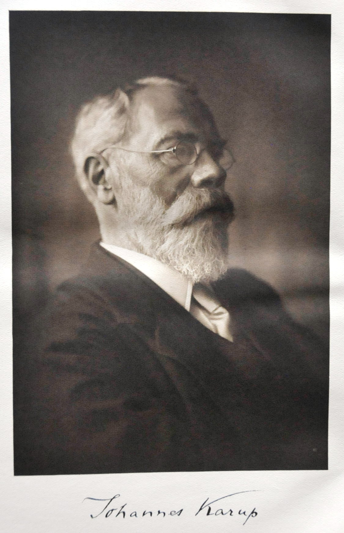 Porträt von Johannes Karup